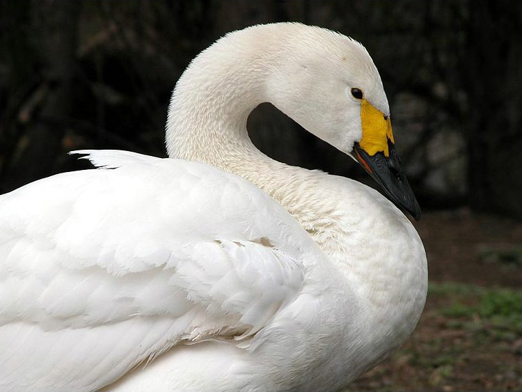 Zwergschwan (Cygnus bewickii) im Zoo Frankfurt.